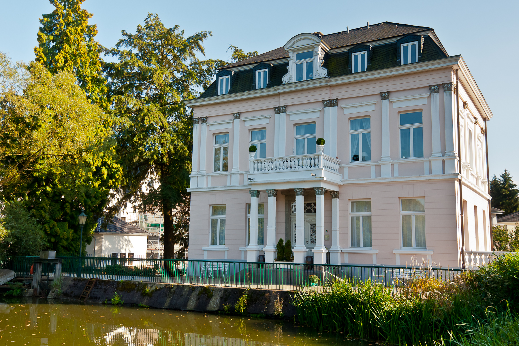 Rösrath, Denkmalnummer 59, Am Hammer 12 (Villa Reusch)